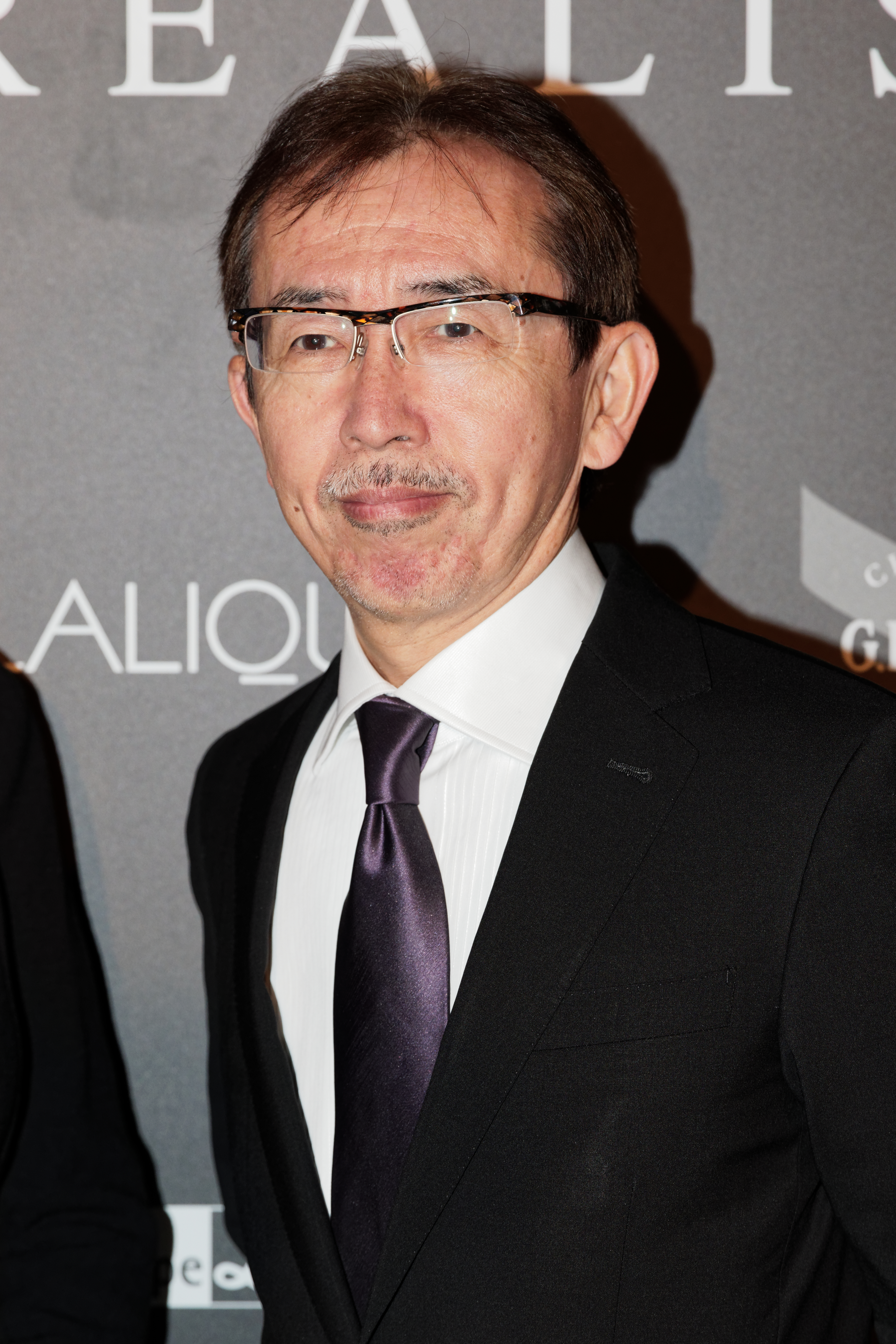 Shiro Nakamura lors du photocall du festival automobile international 2015.